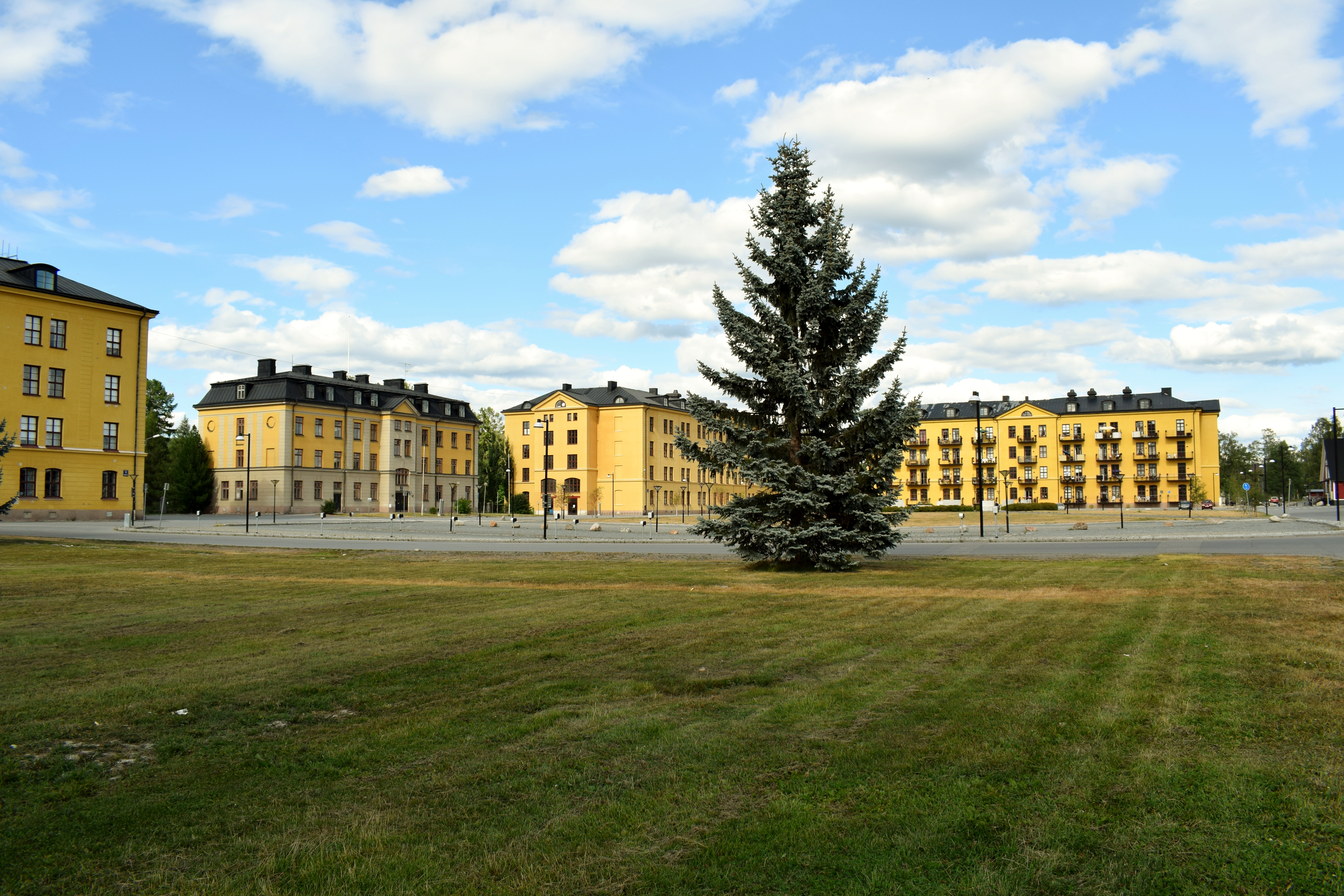 Vy över kaserngård samt kaserner och kanslihus vid garnisonen.